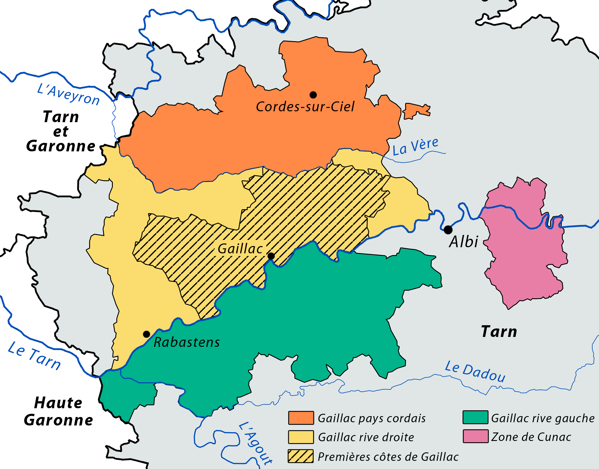 zones d'appellations Gaillac AOC